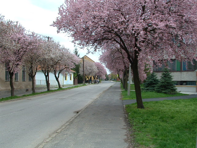 Hajdú-Bihar megye, Berettyóújfalu, József Attila utca